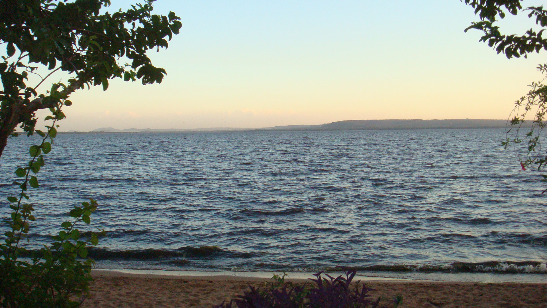 Lago Ypacarai